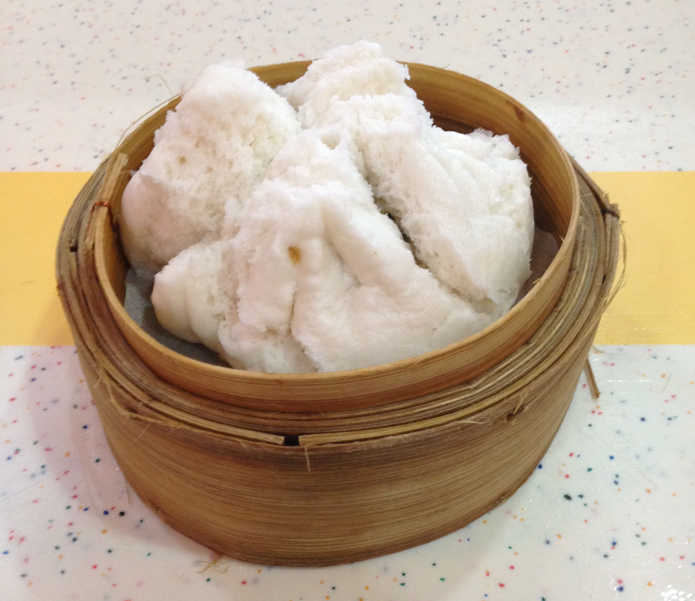 中文（香港）: 一籠雞球大包